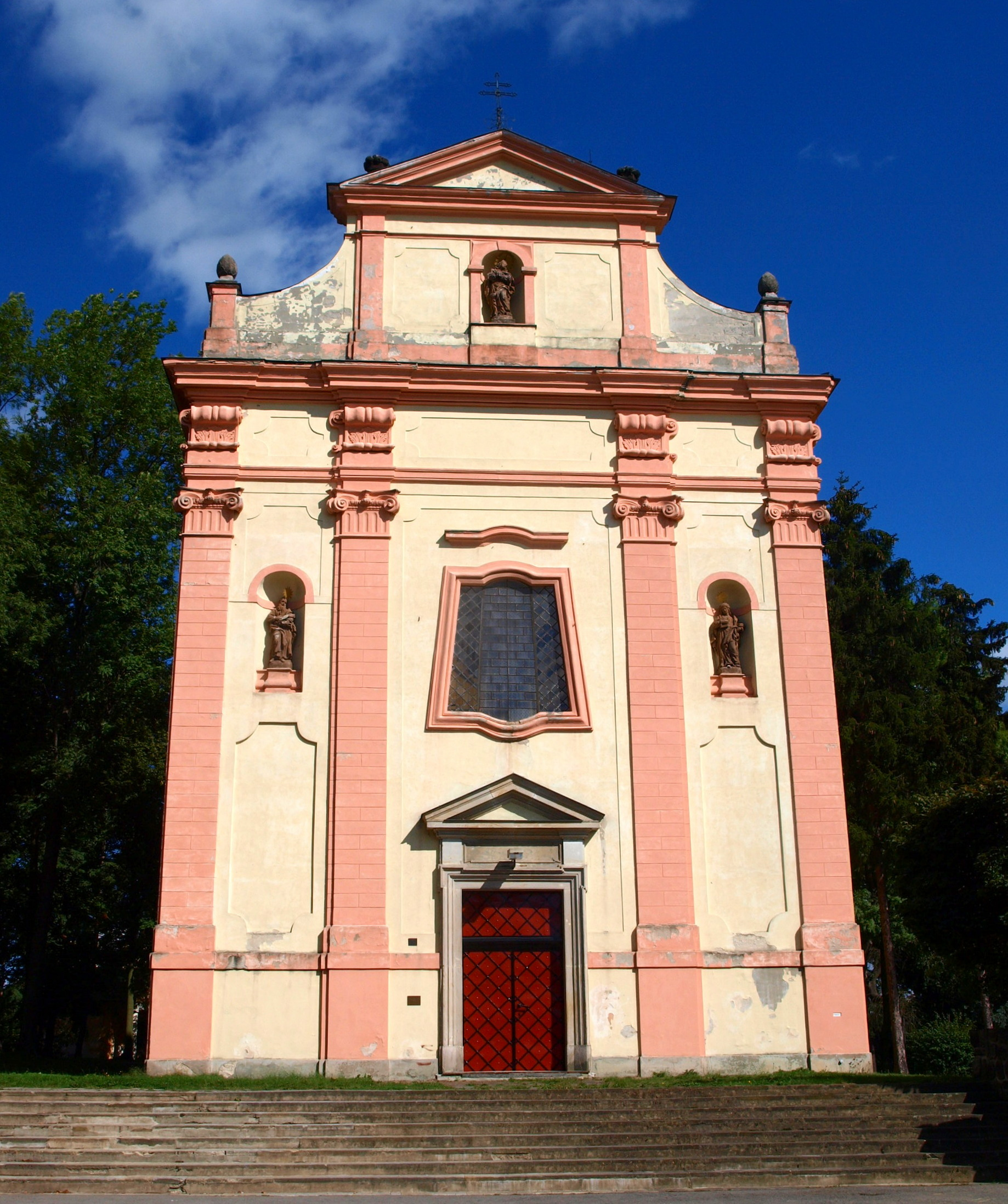 Česká Lípa